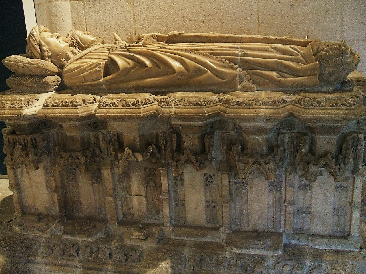 Sepulcro de Don Gómez Manrique y Doña Sancha Rojas (siglo XV), procedente del Real monasterio de Nuestra Señora de Fresdelval y hoy en el Museo de Burgos.